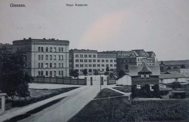 Neue Infanteriekaserne in Giessen